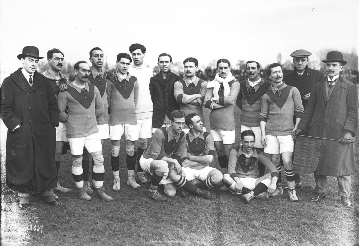 Fotografia de l'equip de futbol de la selecció de Catalunya en l'enfrontament contra la selecció nacional de França el 20 de febrer de 1912 al camp de Colombes de Paris. El partit acabà amb resultat de 7-0, amb victòria francesa